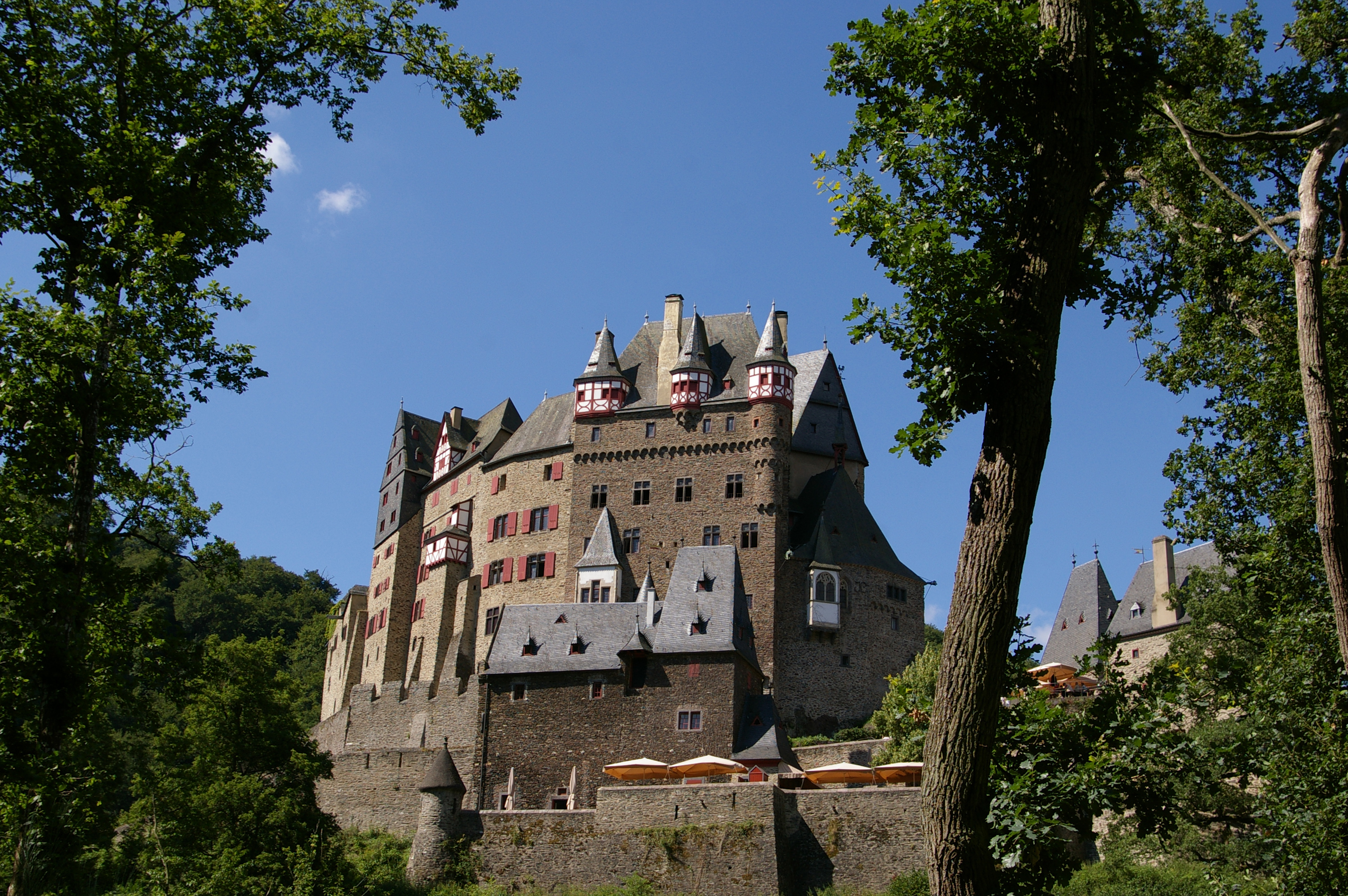 Le château d'Elzt